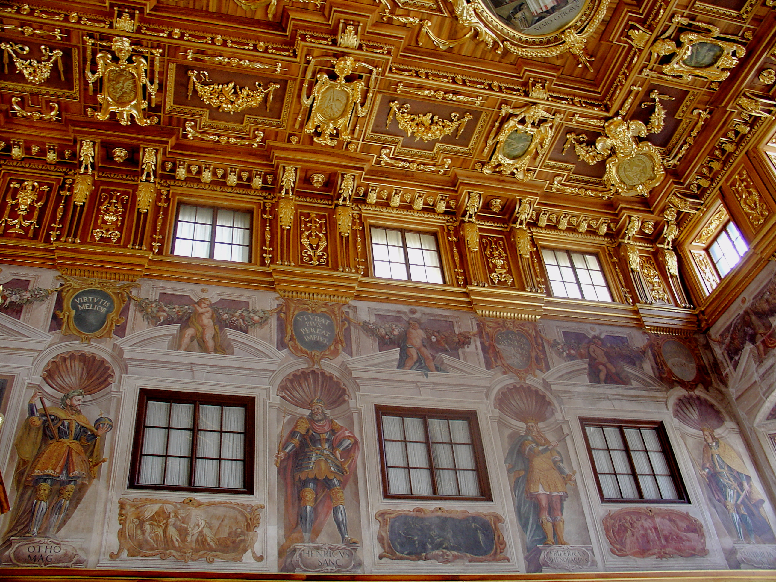 2004-05-23 Augsburg 007 Rathaus